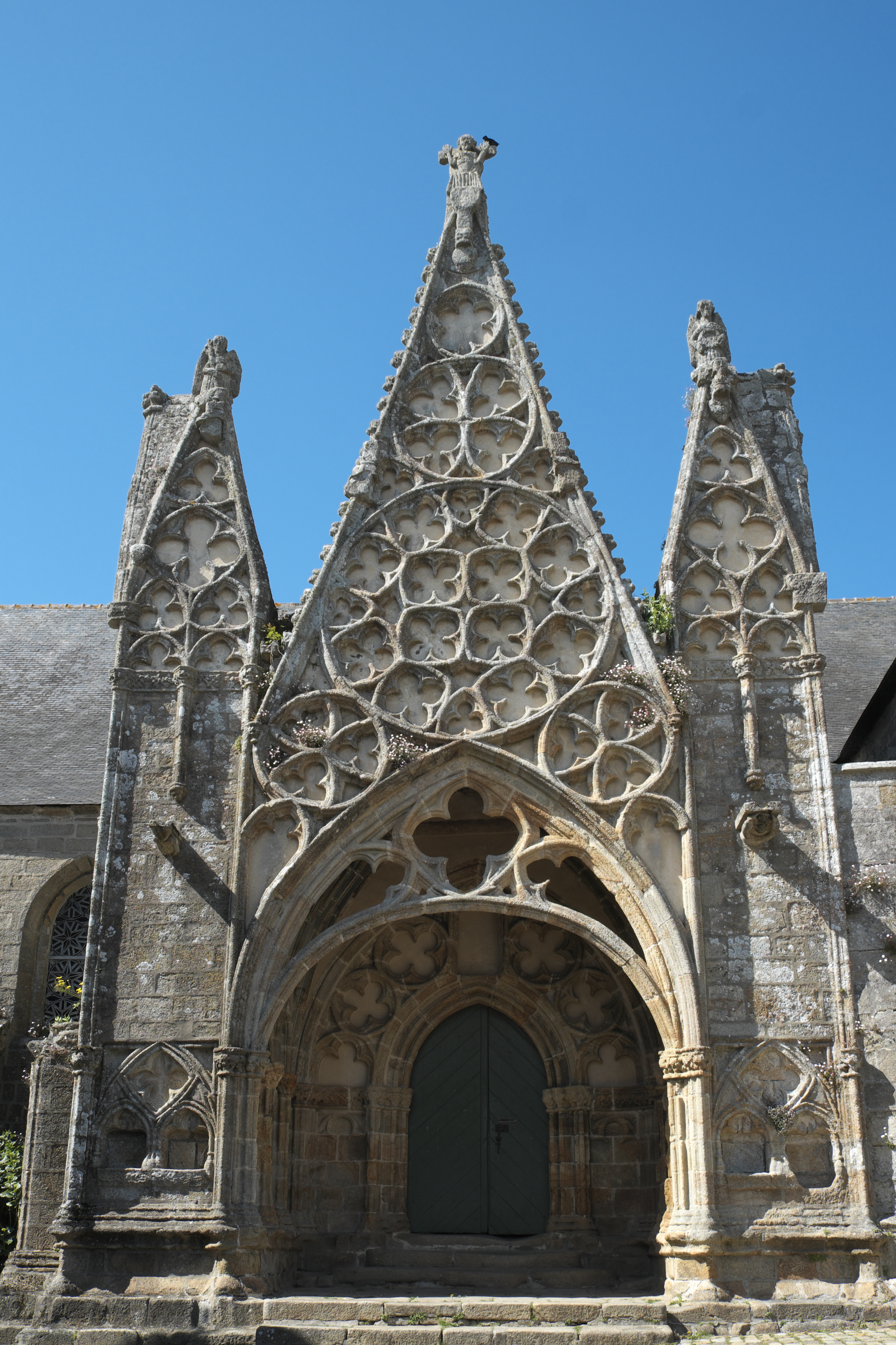 Ehemalige Stiftskirche Notre-Dame-de-Roscudon in Pont-Croix im Département Finistère (Region Bretagne/Frankreich), Portal